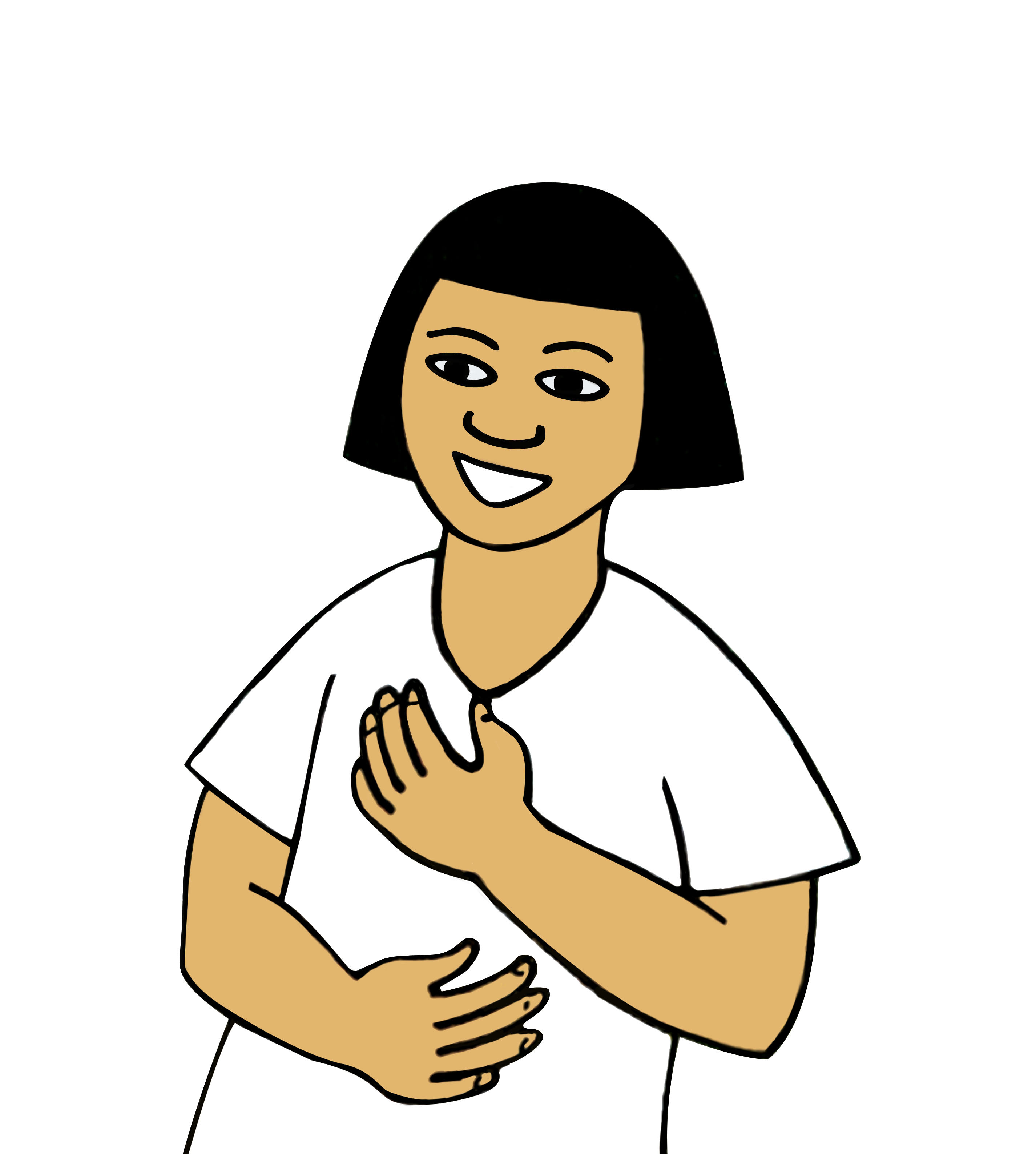 Kaskott